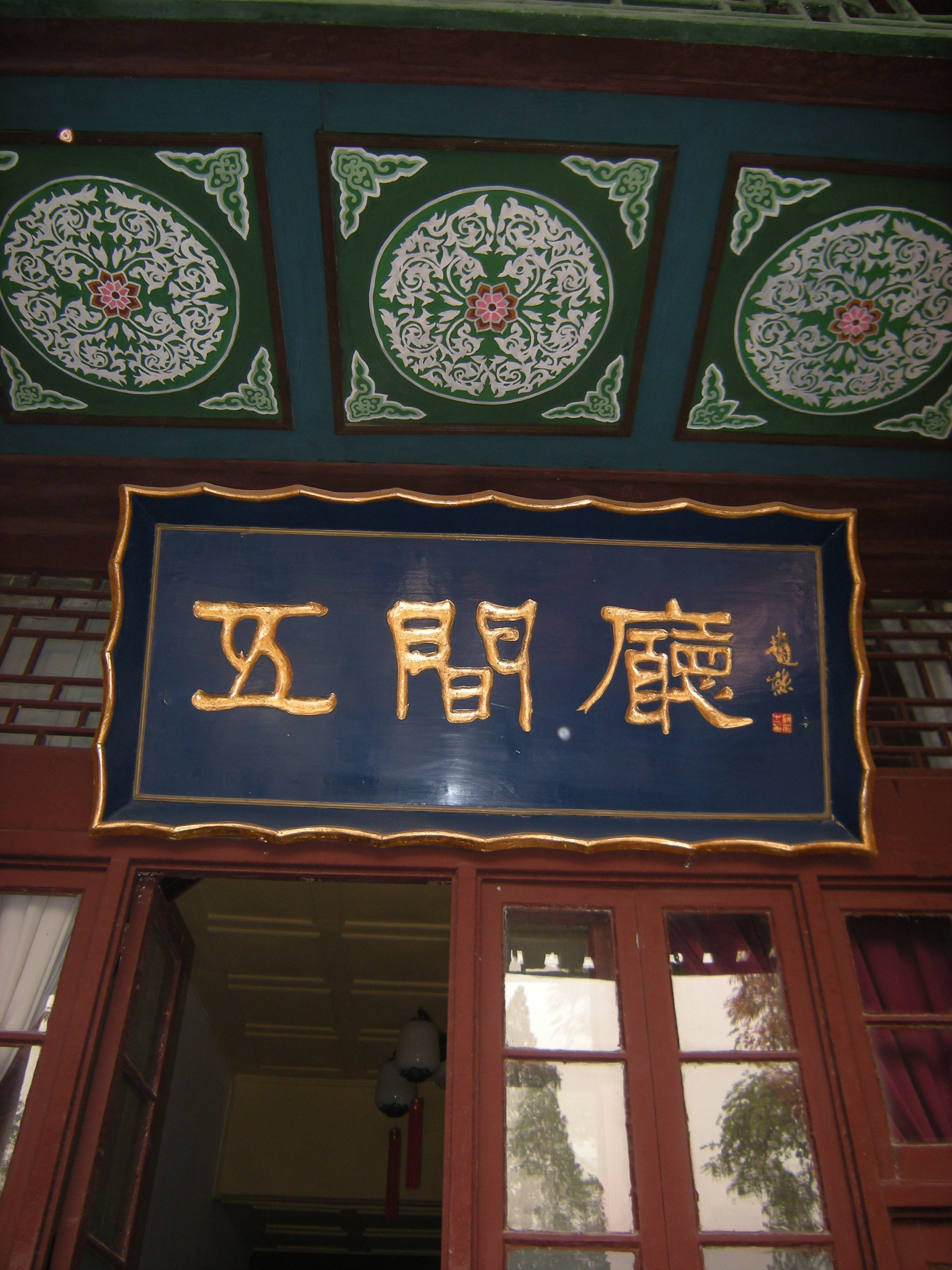 西安事变事发地——五间厅。当时蒋介石所住之处。